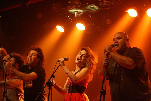 איילת רובינסון, באופרת הרוק-"מלחמה". מאת קובי ויטמן, בבימויו של איקה זהר, בתיאטרון תמונע.